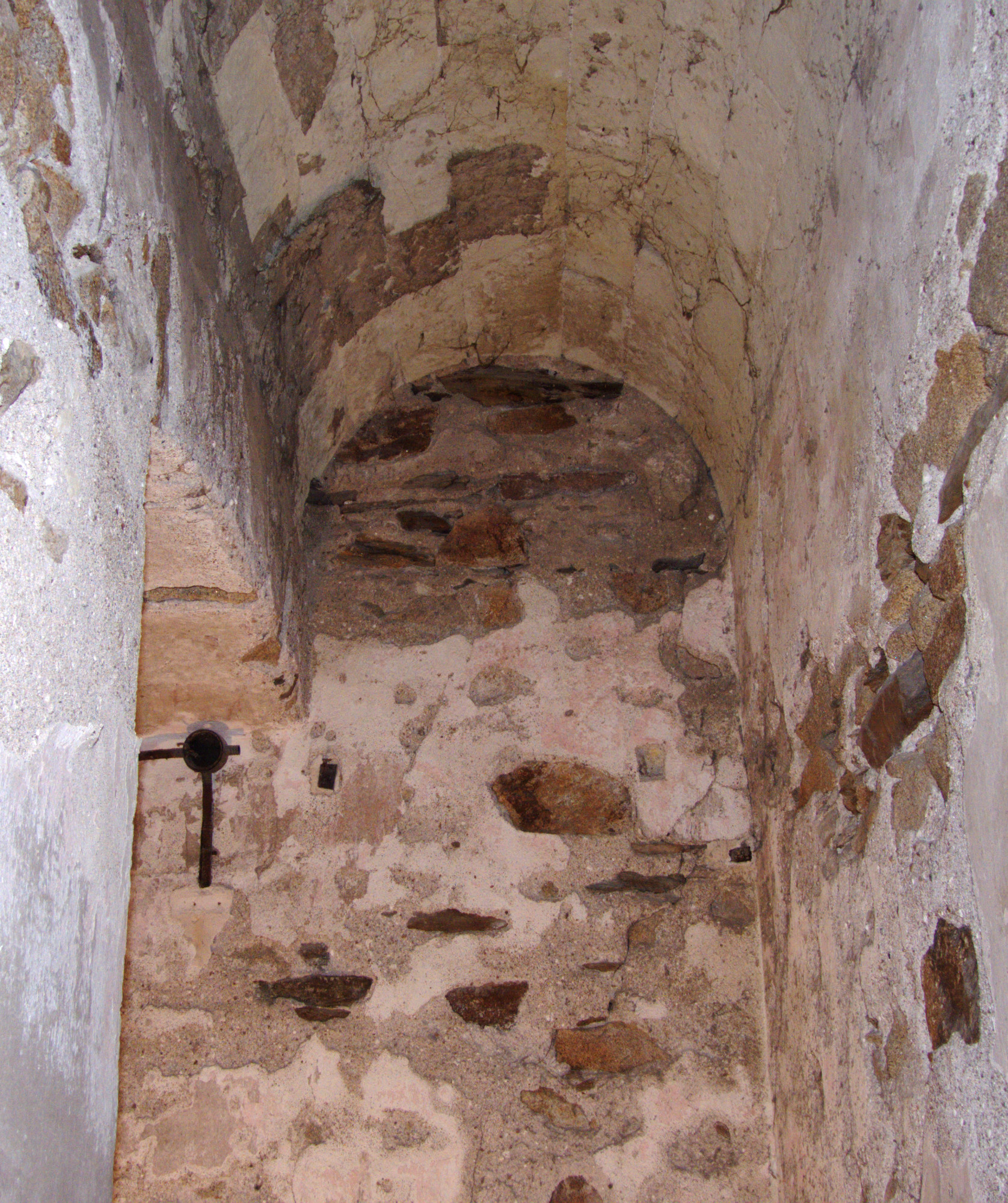 Ces voûtes suppriment les vibrations d'un étage à l'autre. Vibrations risquant de perturber le réglage des instruments du "Cabinet des montres" et les observations astronomiques depuis la terrasse. .